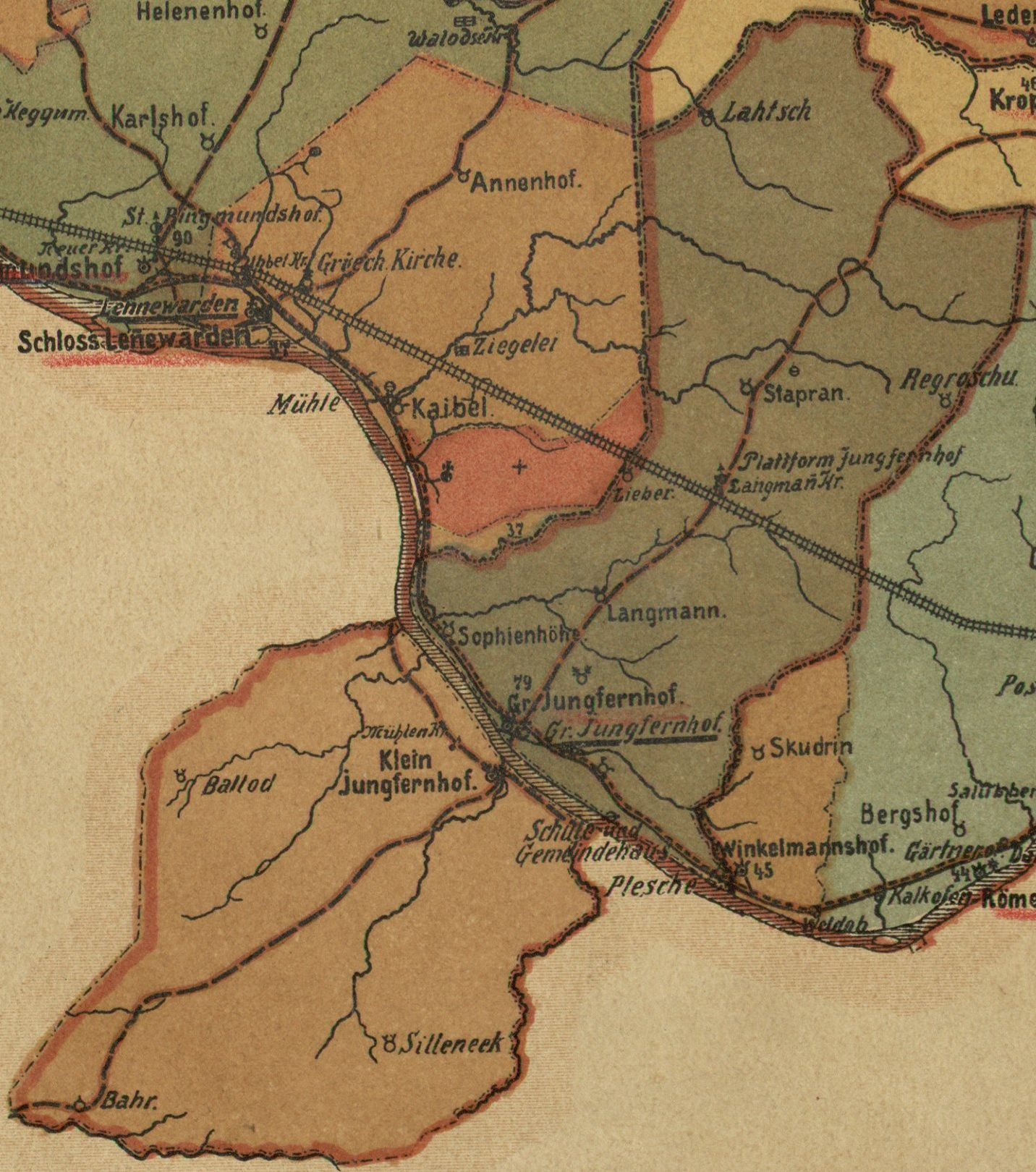 Lieljumprava kihelkonna mõisad 1905. aasta kaardil